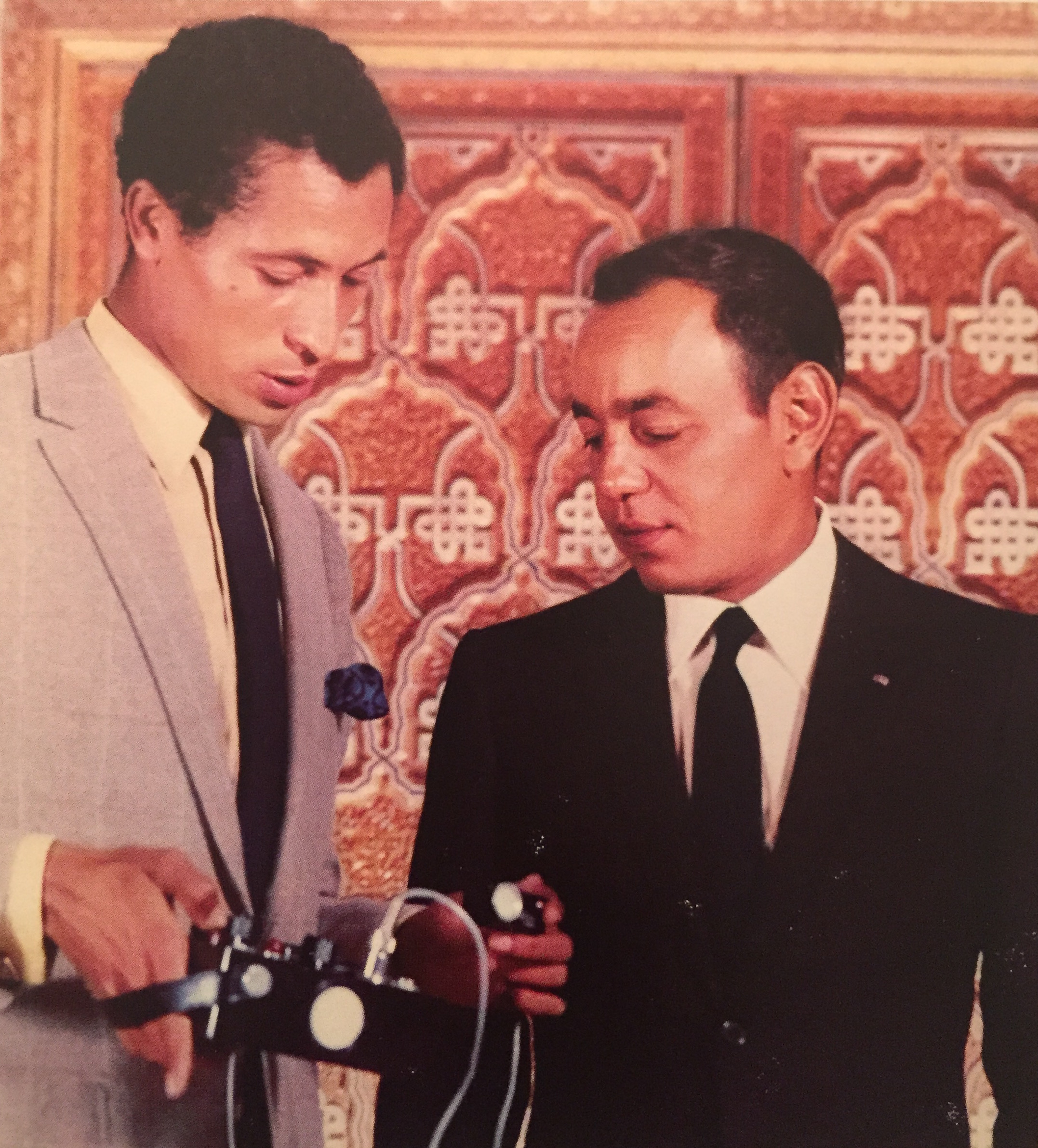 S.M le Roi Hassan pose des questions sur le nouveau matériel photographique à Maradji